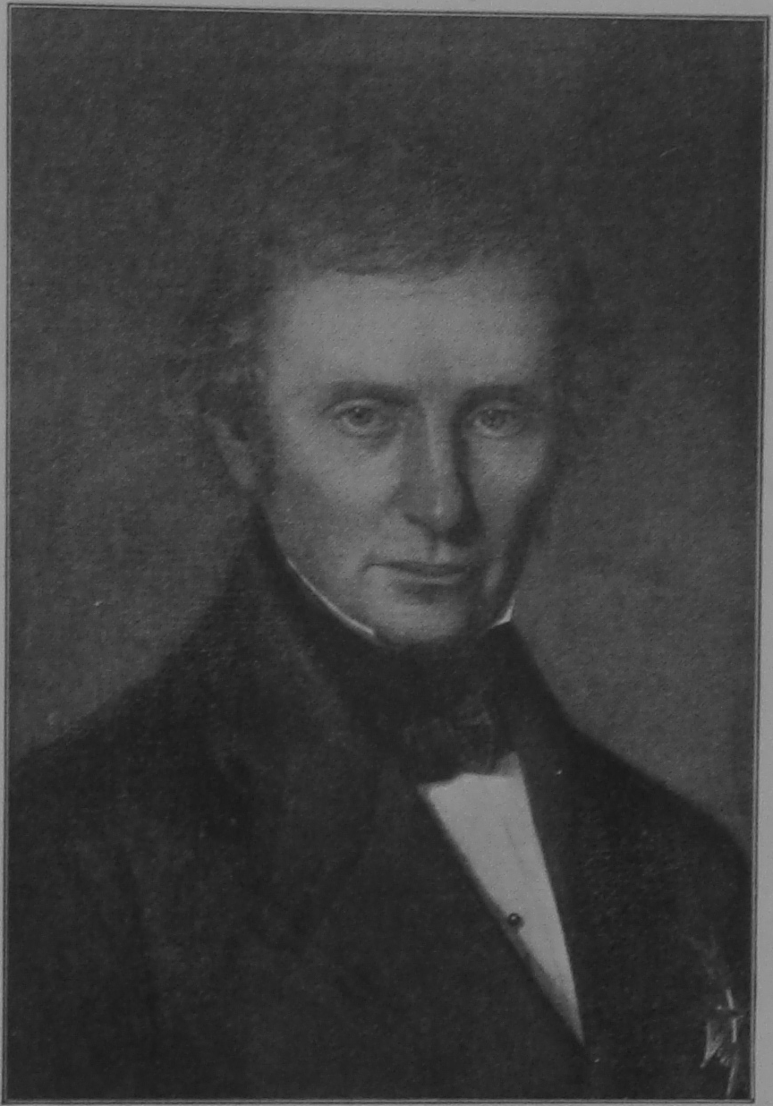 Den norske embetsmannen Jørgen Herman Vogt (1784–1862).